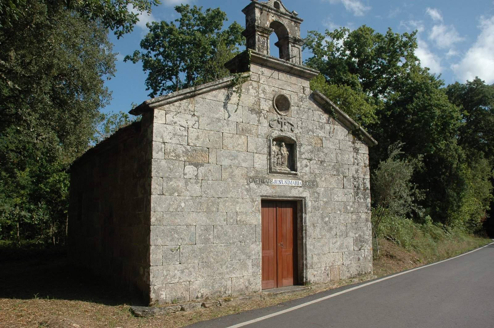 Capela de Campelos, na parroquia de Olveira, concello de Ribeira